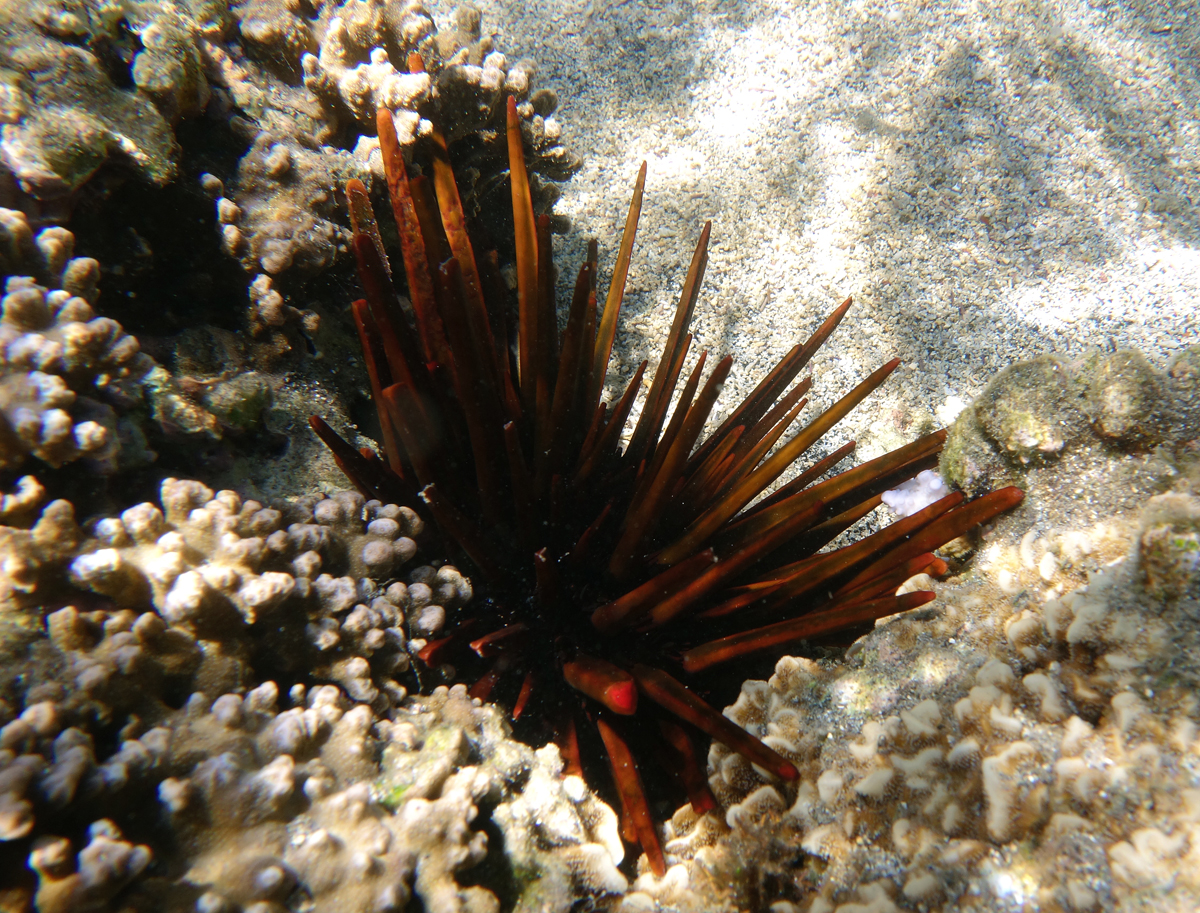 Un oursin-crayon Heterocentrotus trigonarius à la Réunion.